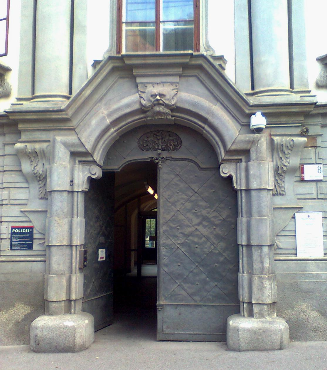 Palais Wildenstein, Graz, Portal